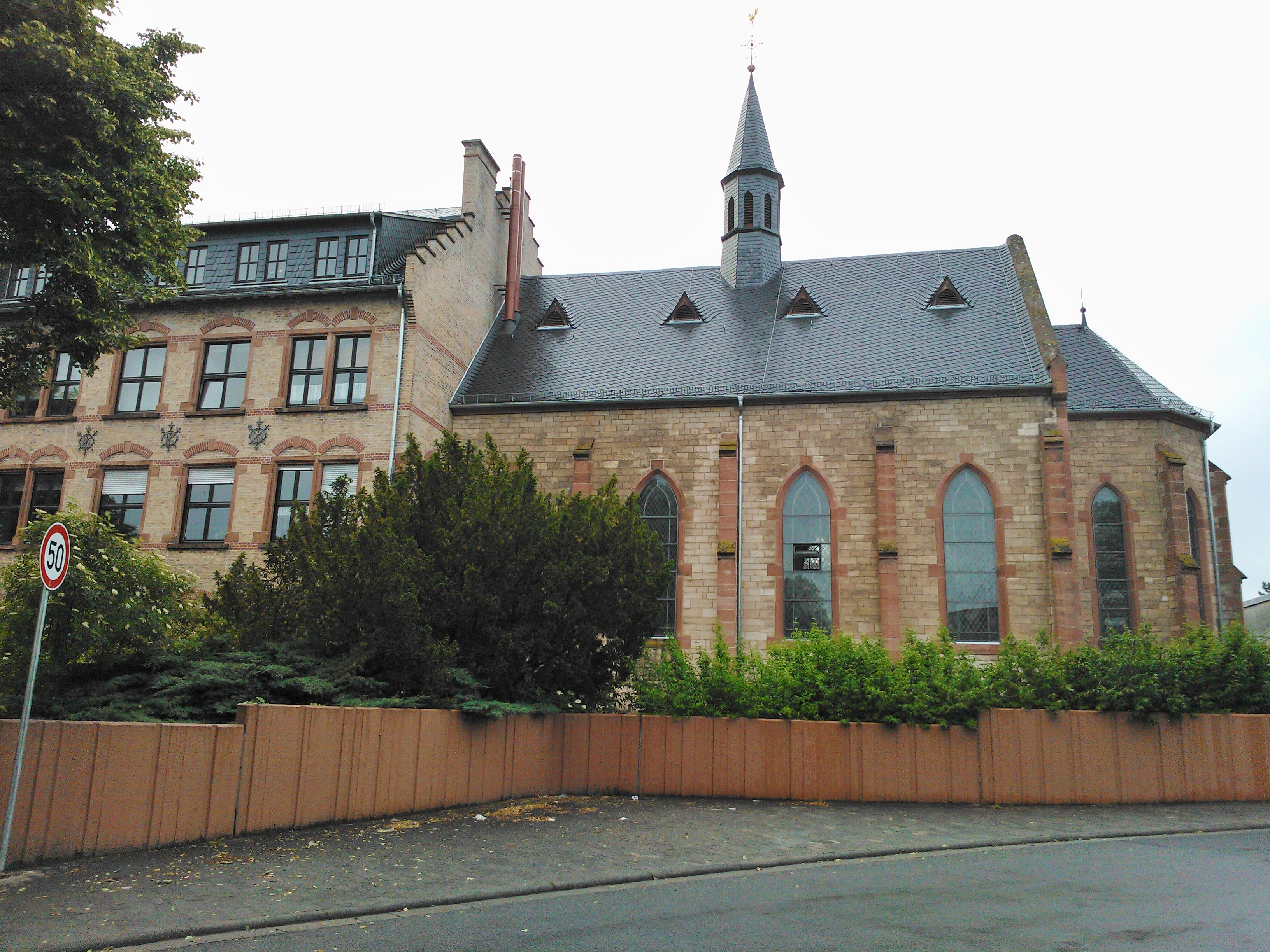 St. Josephshaus in Klein-Zimmern, ehemalige Wasserburg. Kapelle und Verwaltungstrakt